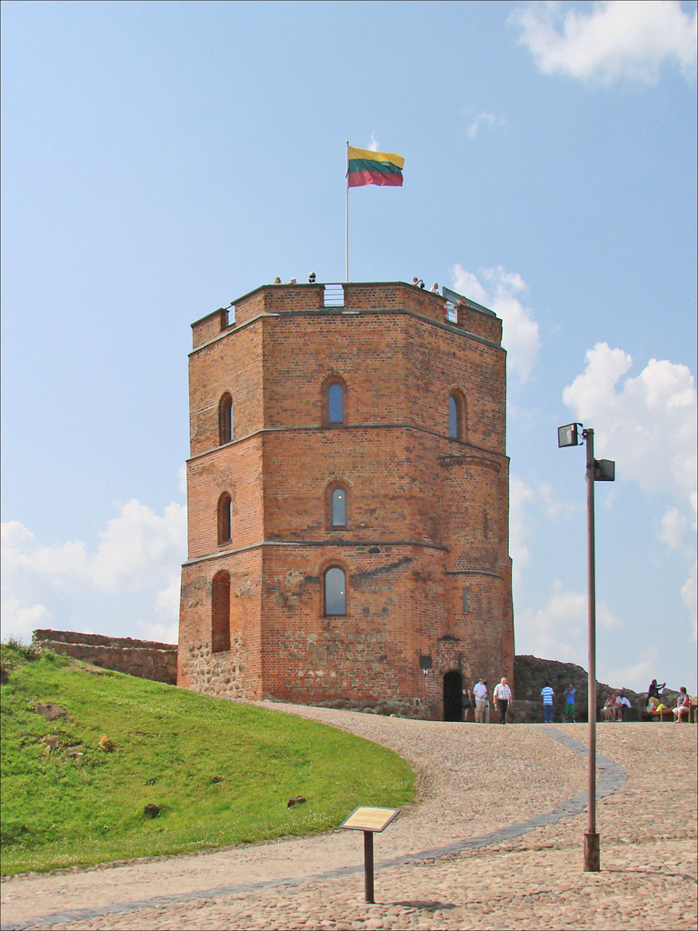 Le château de Gediminas est devenu le symbole de la ville de Vilnius. Il a été construit au début du 14ème siècle, pour défendre la cité (voir la maquette). Détruit lors de la guerre avec les russes en 1655, il n'a pas été reconstruit. Seule persiste la base de cette tour qui a été transformée en musée et en plateforme d'observation ouverte au public. Article de Wikipedia sur Vilnius Site sur Vilnius